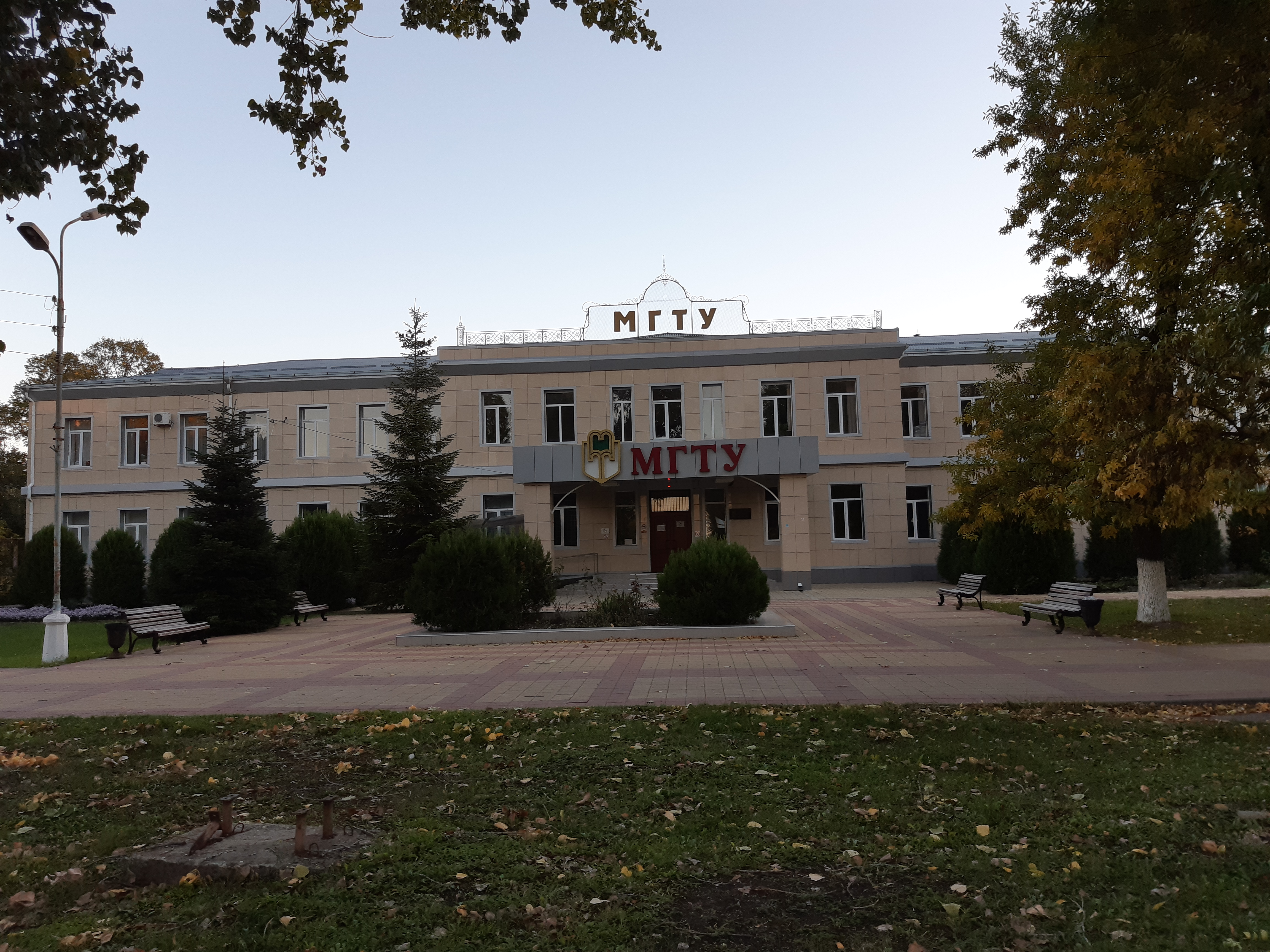 Майкопская горская школа: улица Пушкина, 177, Майкоп, Адыгея